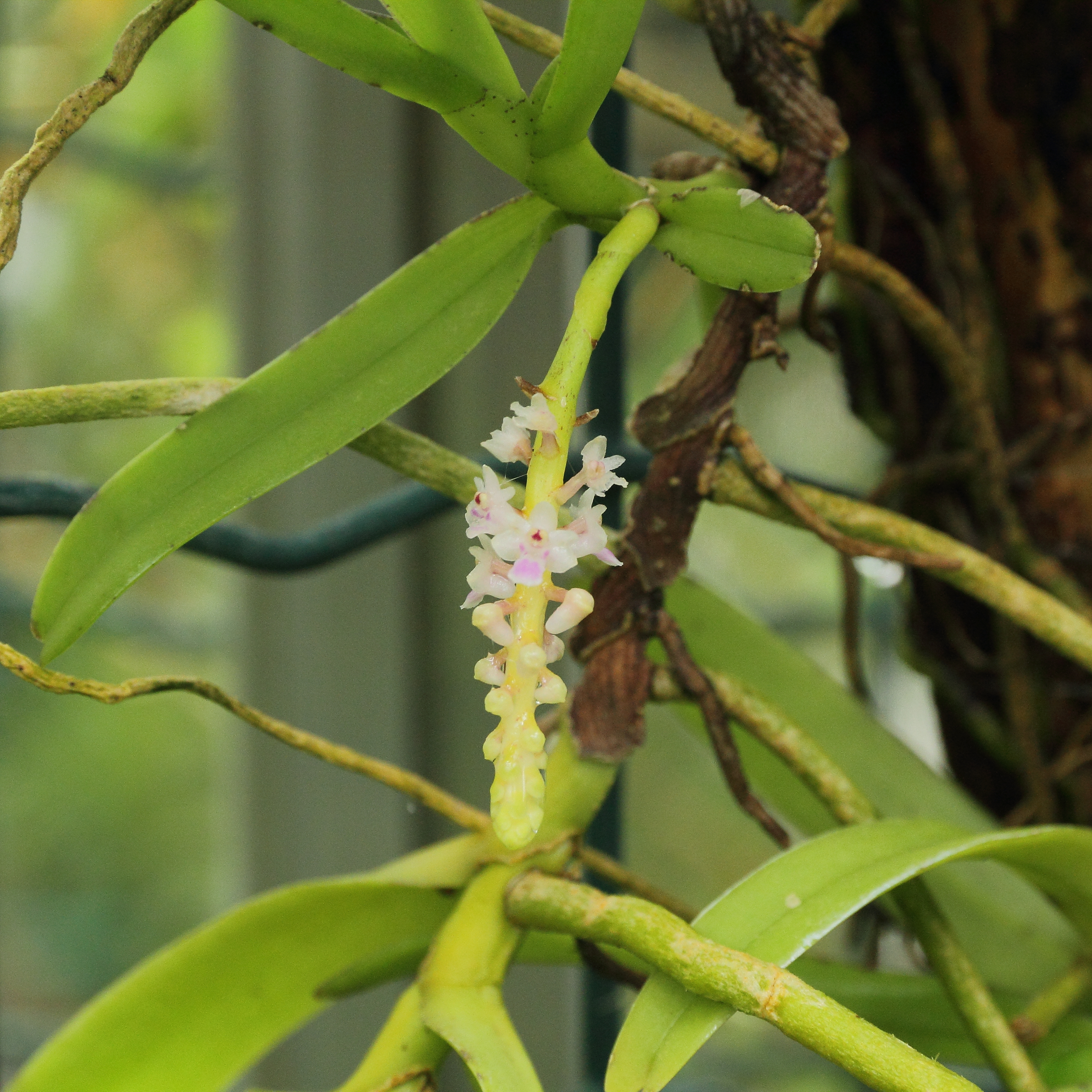 Smitinandia micrantha i Göteborgs Botaniska Trädgård.